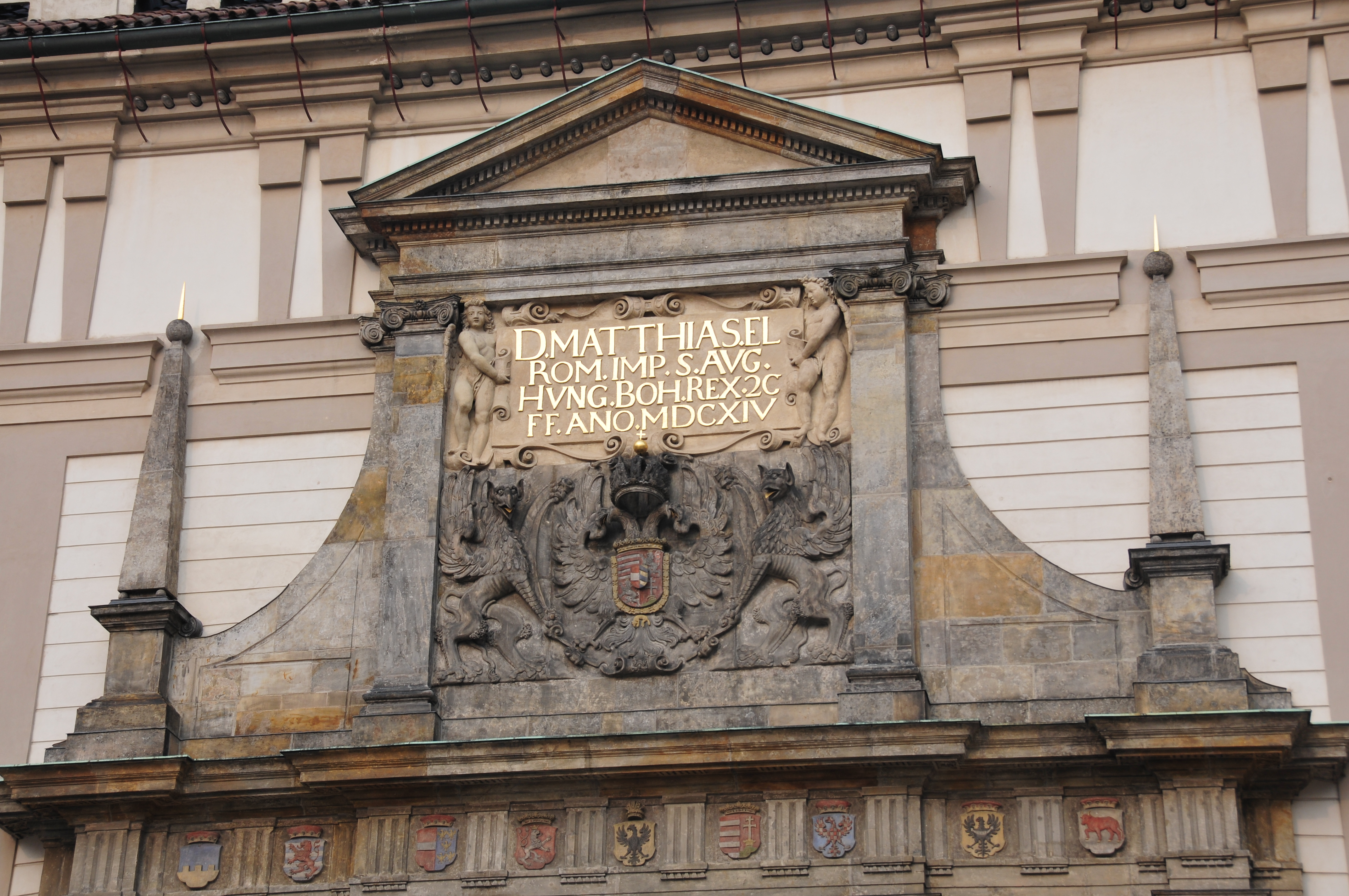 Prag